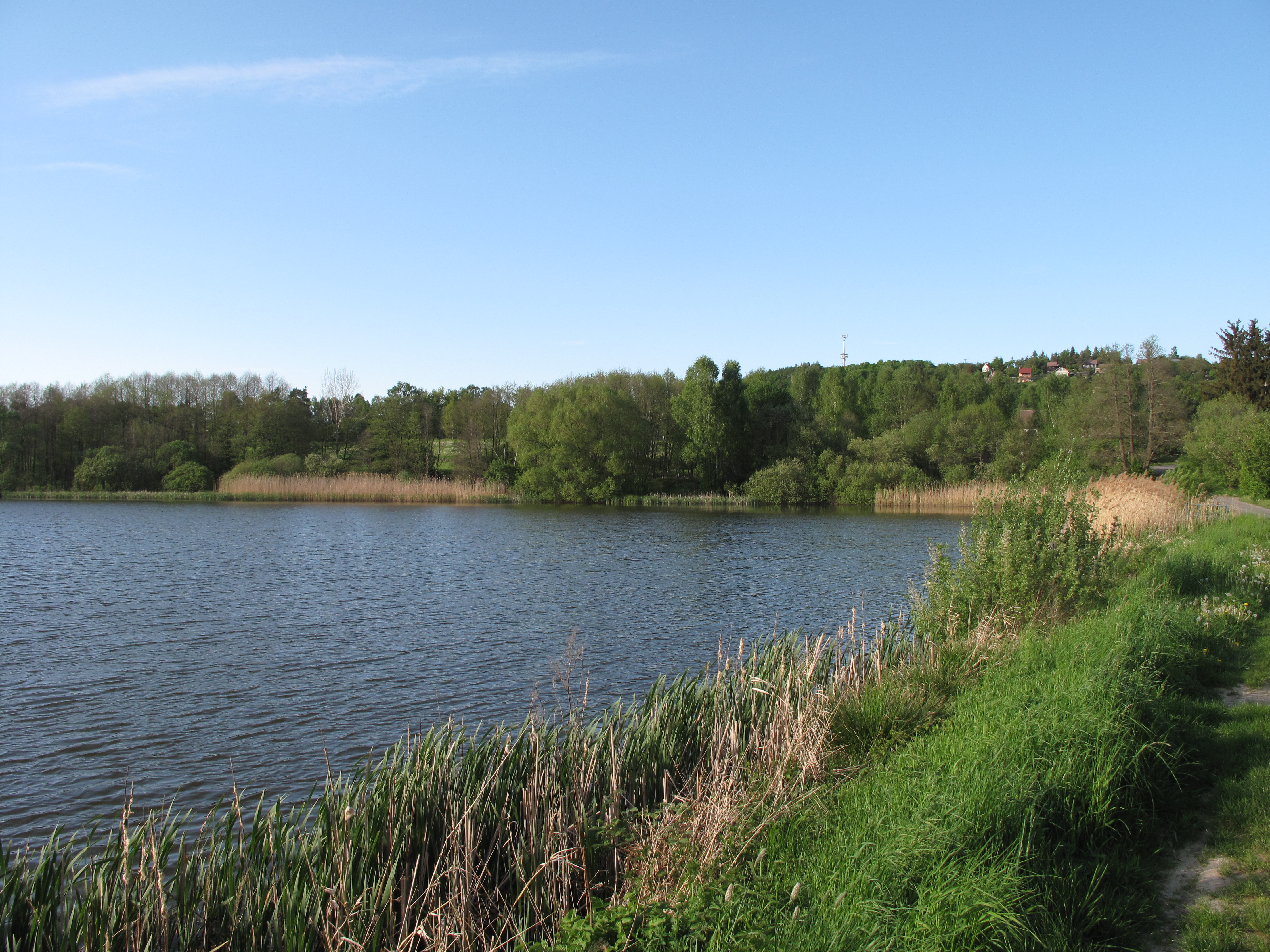 Přírodní památka Na Novém rybníce. Okres Rakovník, Česká republika.